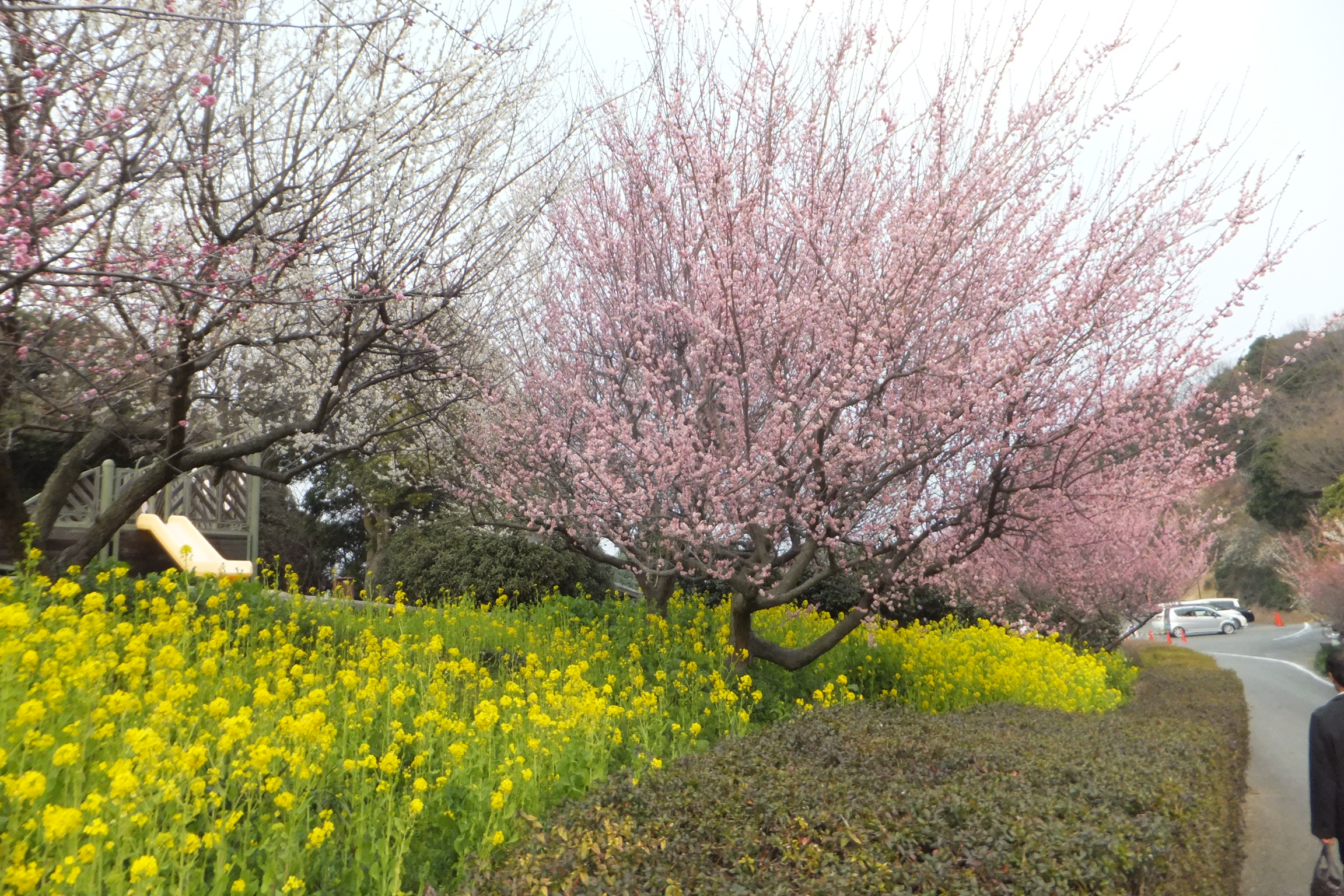 御津自然観察公園（世界の梅公園）